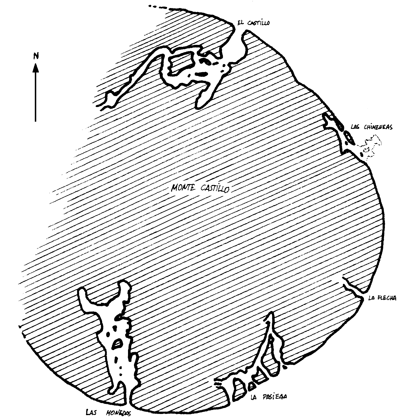 Plano del Monte Castillo, Importante conjunto arqueológico en el que se aprecian las diferentes cuevas con arte rupestre del Paelolítico: Cueva de El Castillo Cueva de Las Chimeneas Cueva de La Pasiega Cueva de Las Monedas